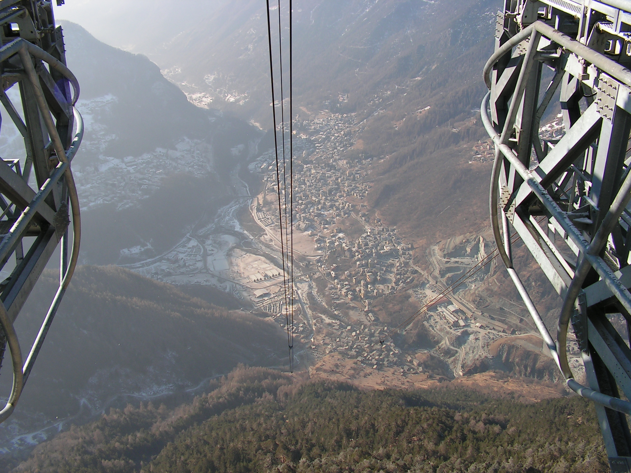 Chiesa in Valmalenco vista dalla stazione di arrivo della Funivia Autore: Snowdog